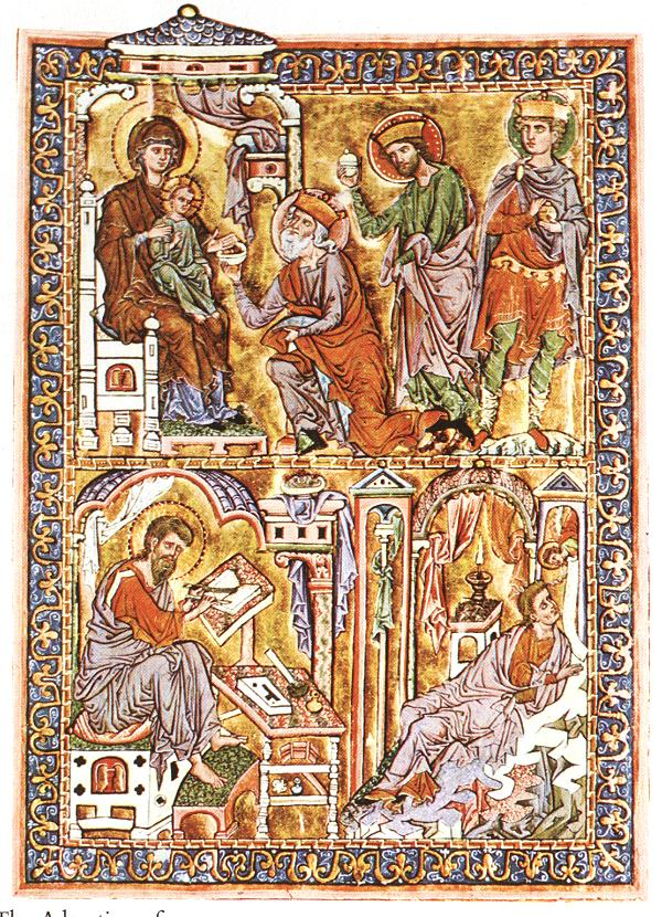 Imago ex evangelio Sancti Matthaei, anno 1235-40 pinctum.